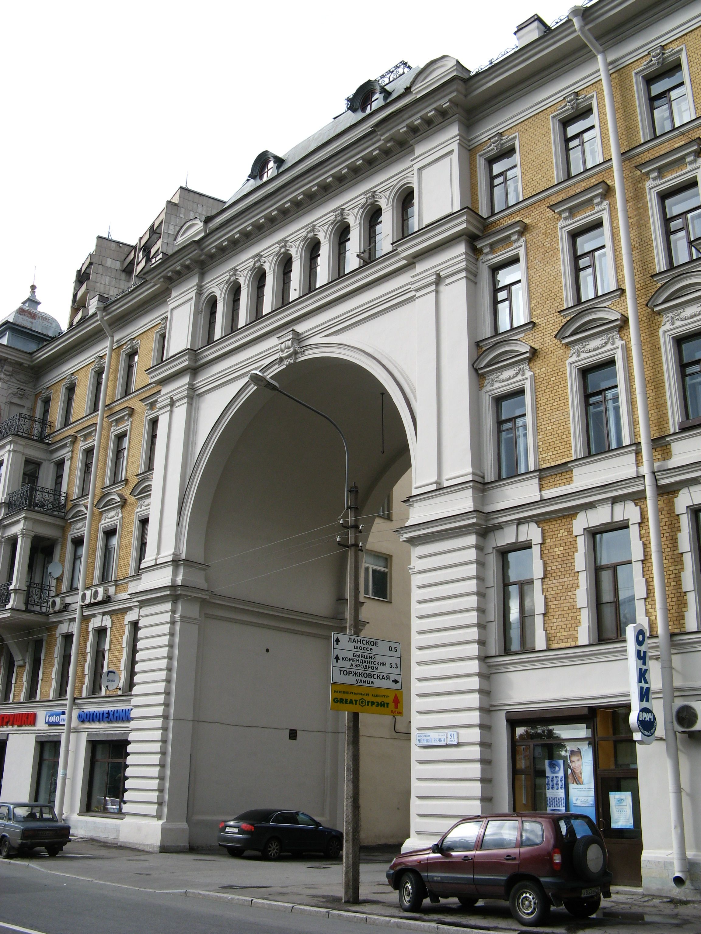 Доходный дом Д. И. Поршнева. Санкт-Петербург, набережная Черной речки, д. 51. Архитектор М.Д. Розензон, 1902